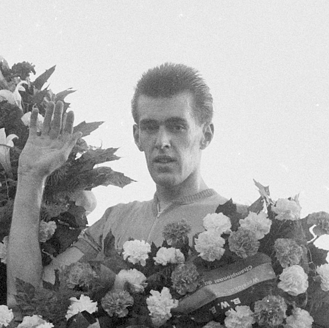 Wereldkampioenschappen wielrennen amateurs op de weg. Schalk Verhoef